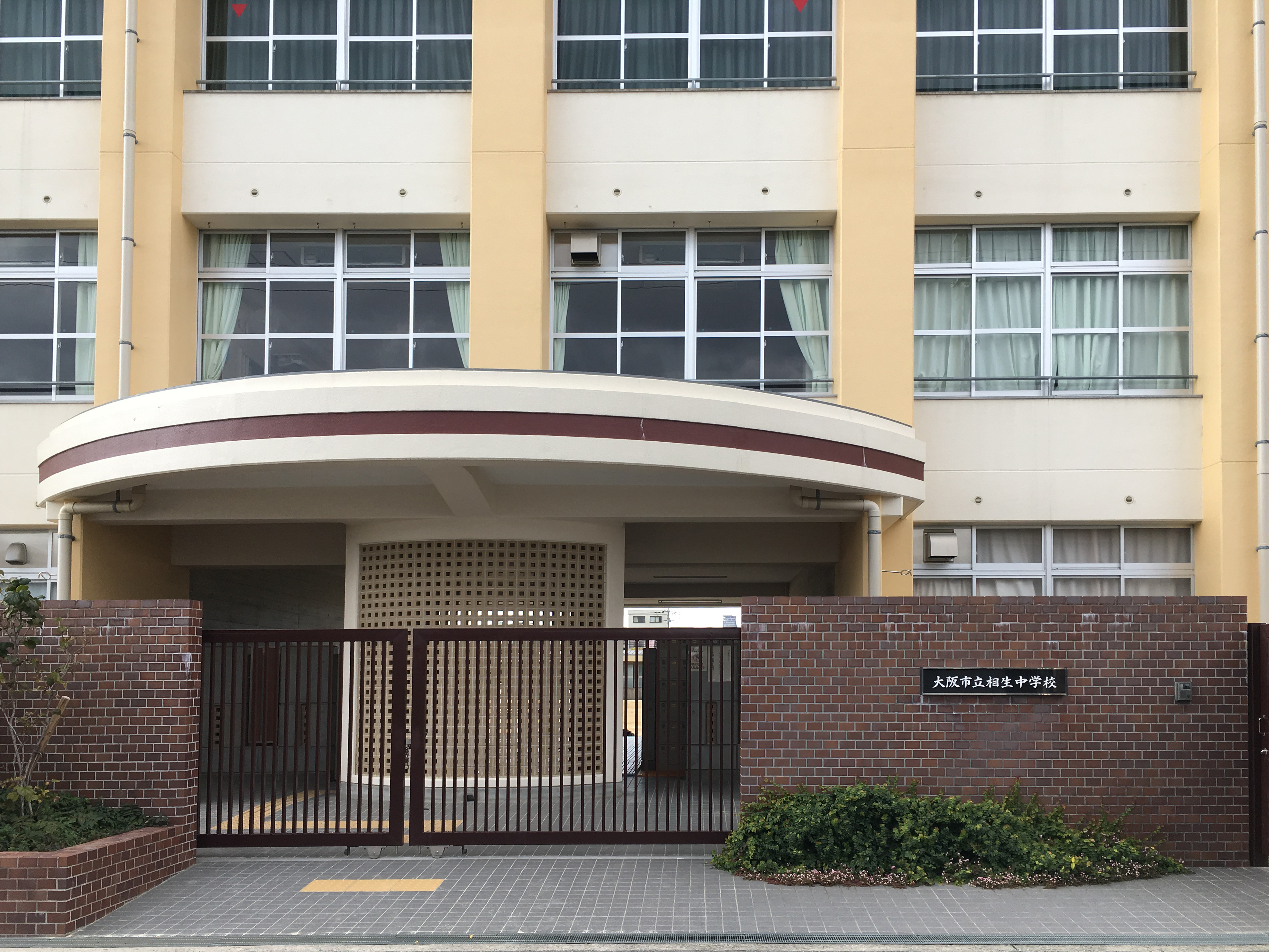 大阪市立相生中学校